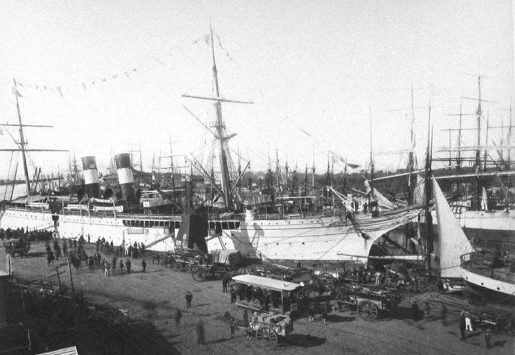 Muelle del "Riachuelo de los Navíos", ubicado en el barrio de La Boca, Buenos Aires.